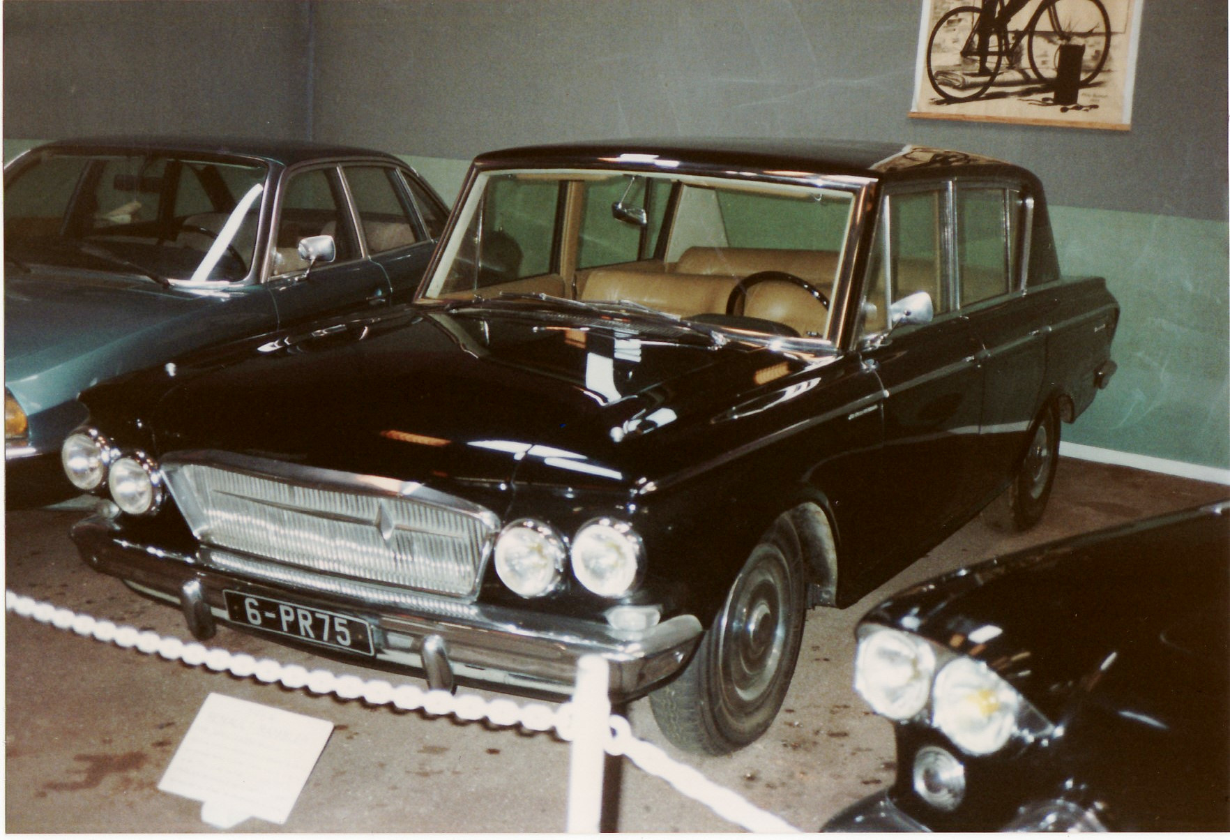 Rambler Renault Presidential 1962